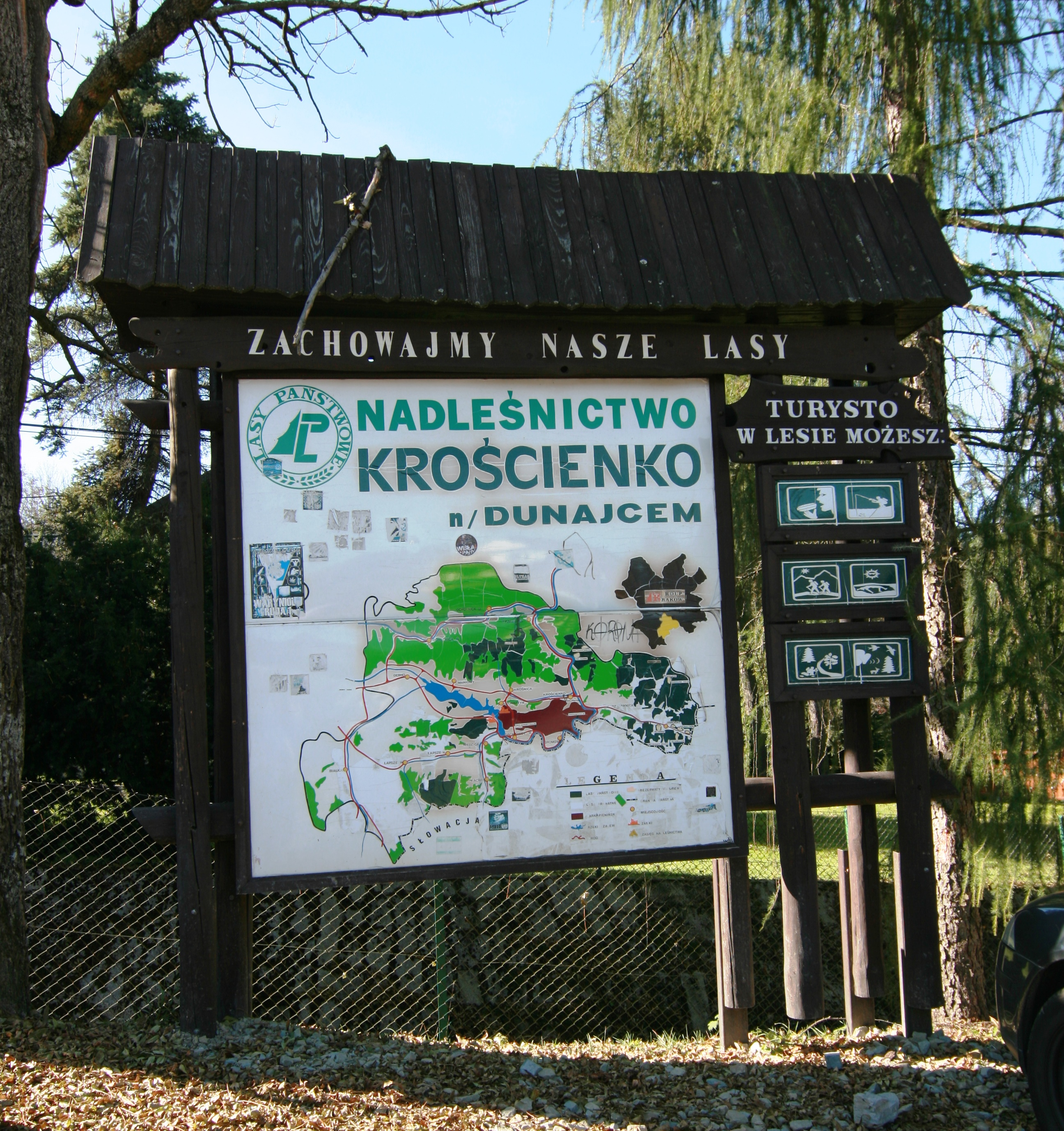 Mapa nadleśnictwa Krościenko nad Dunajcem przed siedzibą nadleśnictwa przy ul. Trzech Koron 6